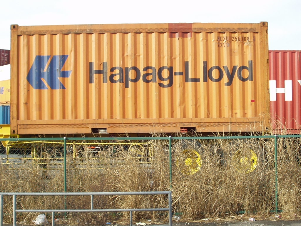 国際海上での『 食品や樹木 』輸送用に、ドイツ 『 ハパックロイド 』が所有している20ft型、通風コンテナ。 ※コンテナタイプコード ( 22V0 ) 使用。 【 大阪府／大阪港南港にて 】